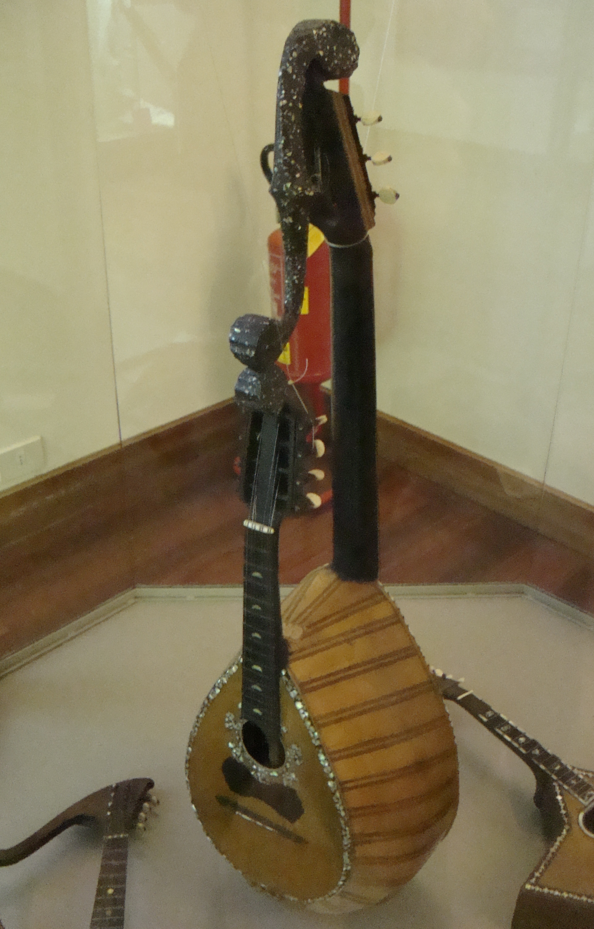 Instrument double guitare-mandoline, région de Naples, fin XIXe-début XXe siecle, Museo Nazionale degli Strumenti Musicali de Rome